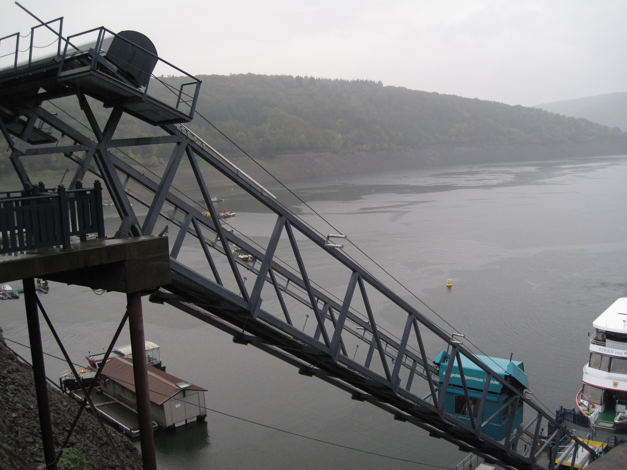 Anleger Edertalsperrmauer Westufer mit Personenkabinenseilbahn.